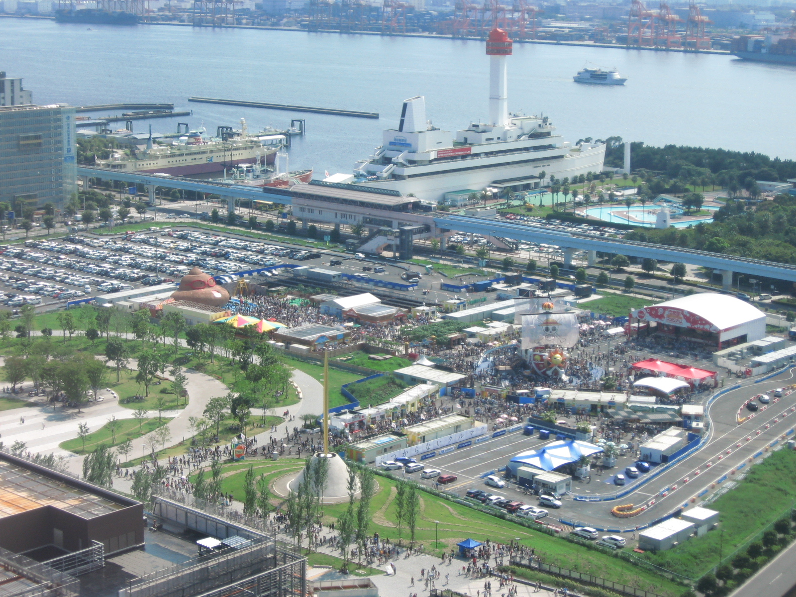 フジテレビの夏イベント「お台場合衆国」の屋外エリア、「合衆国サンサンアイランド」の全景。フジテレビ本社屋24階より撮影。後方に船の科学館が見える。（2011年8月）